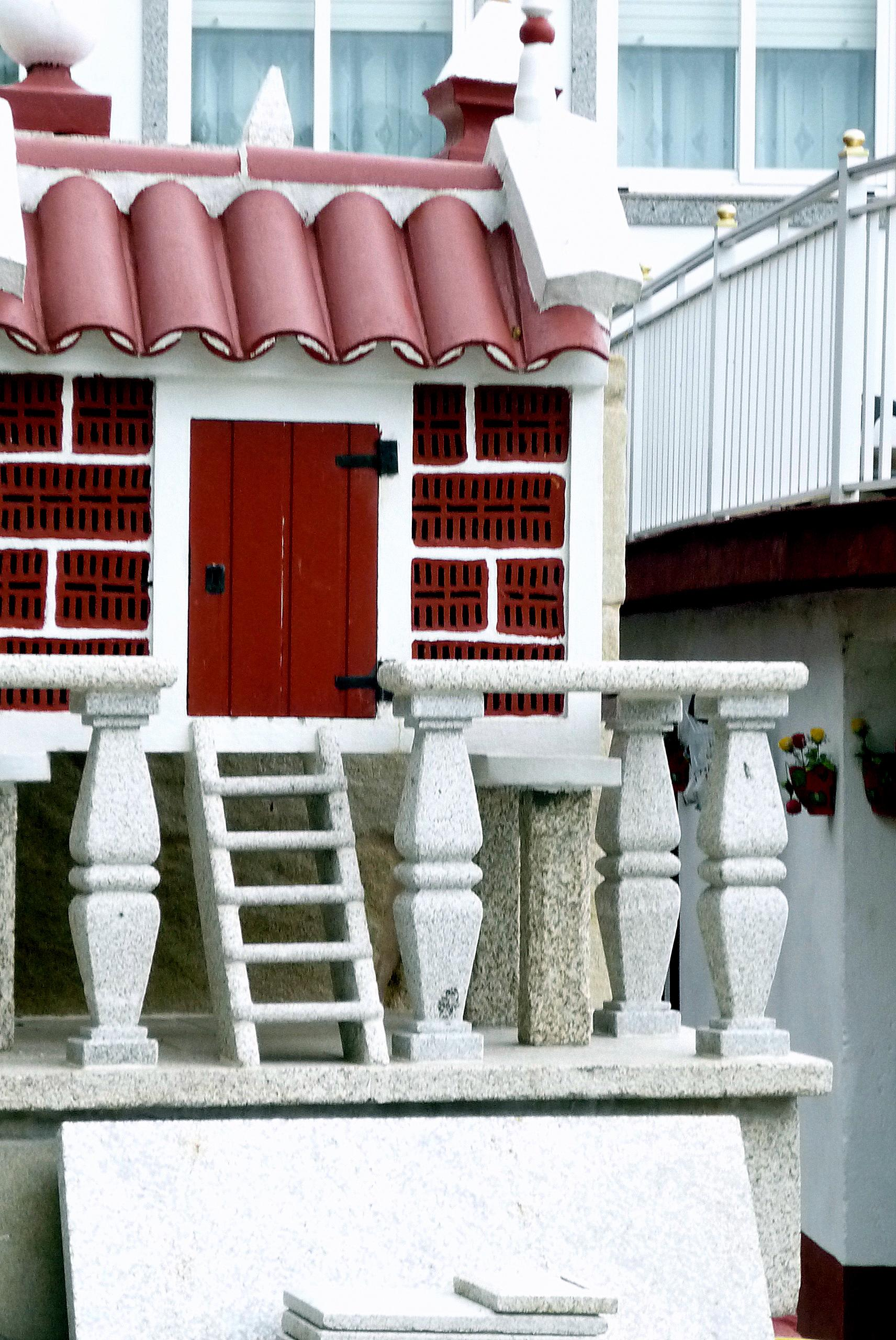 Hórreo ornamental, Porto do Son